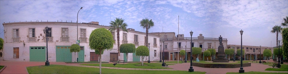 Plaza José Galvez en El Callao, Perú. En honor al héroe en la lucha del Combate de 2 de Mayo.